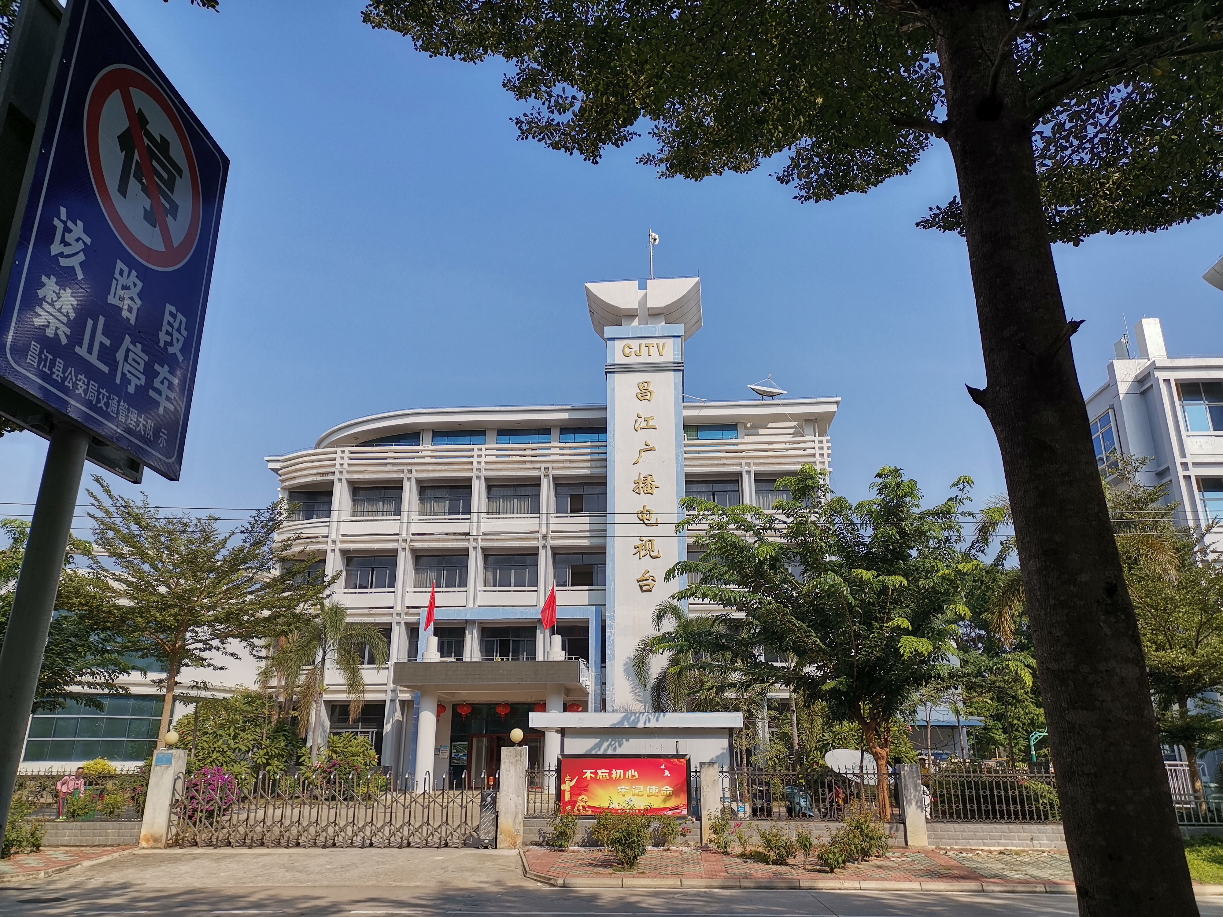 中文（中国大陆）: 昌江广播电视台